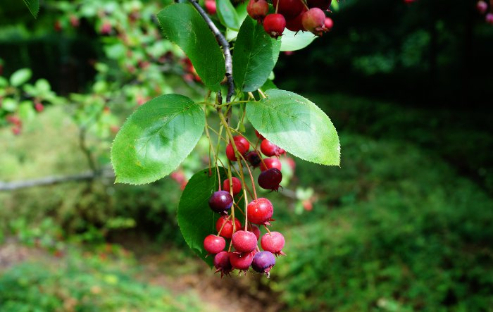 Echte Felsenbirne - Amelanchier rotundifolia - reife Früchte